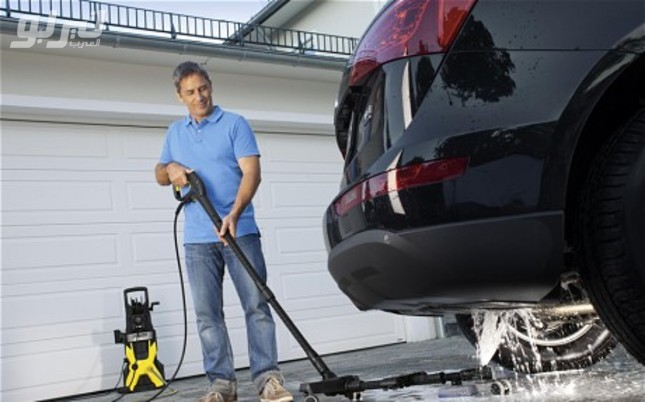 منظف الشاسيه لغسل السيارة من الأسفل